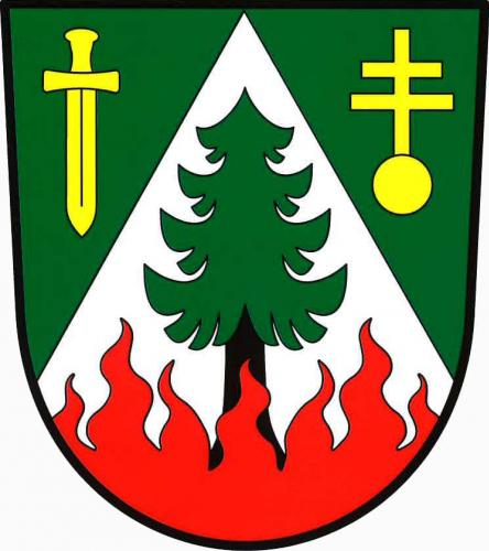 znak, Žárovná, okres Prachatice